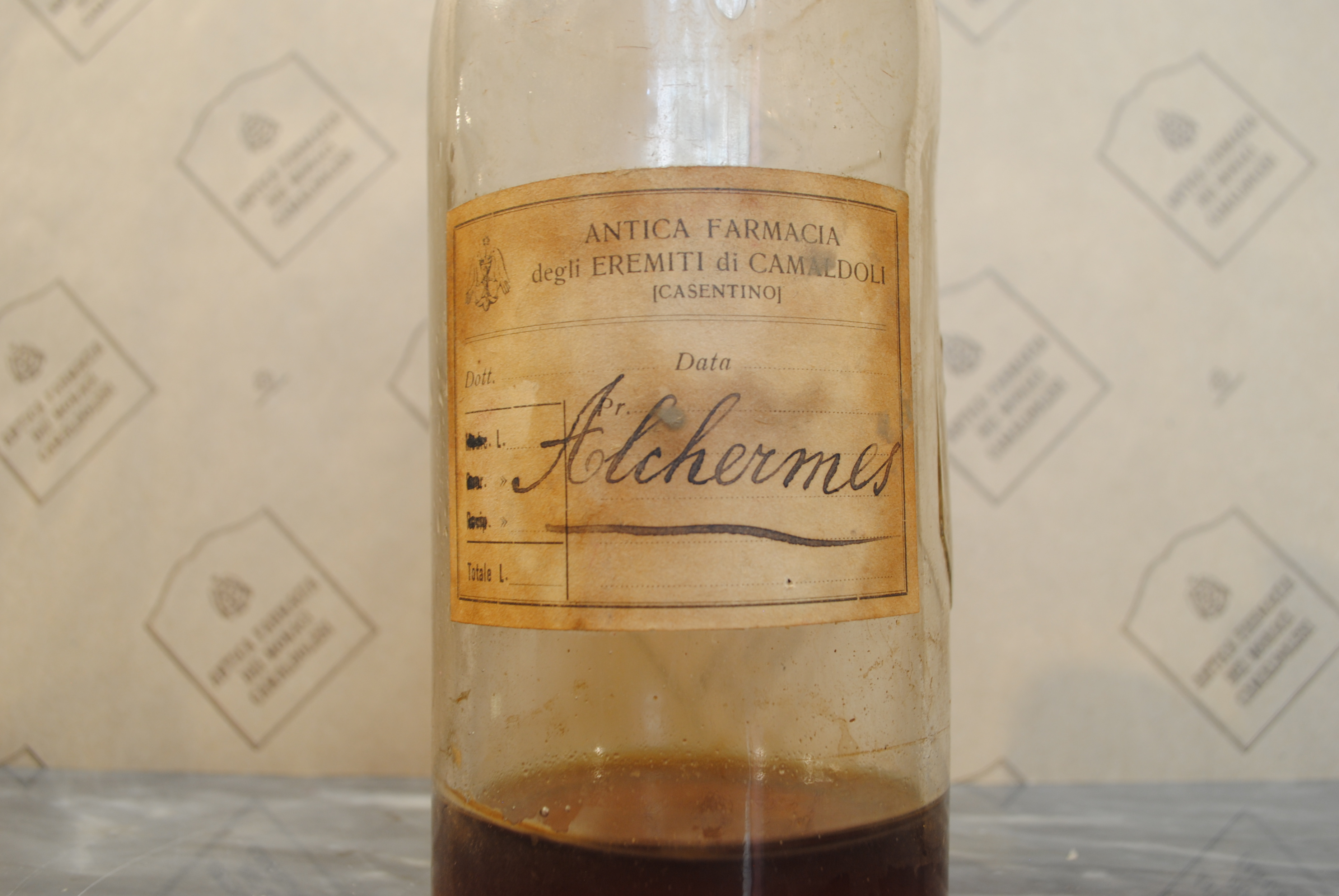 Antica bottiglia alchermes nella farmacia di Camaldoli